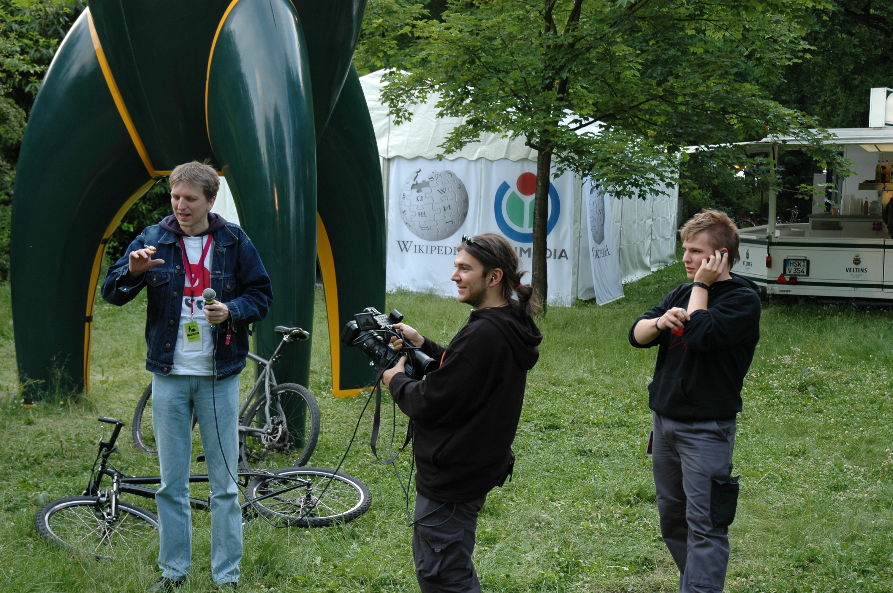 TV-Fnord vor dem Wikipedia-Zelt